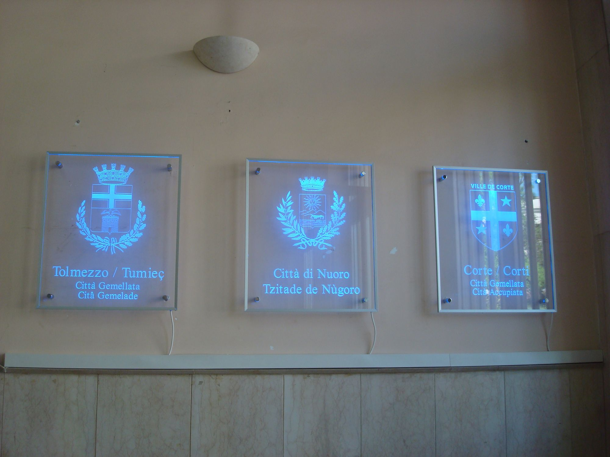 Installazione al neon con gli stemmi delle città gemellate con Nuoro, collocata all'ingresso della casa comunale.